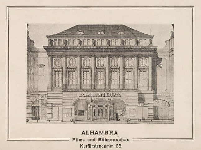 Einladung zur Eröffnung des Kino Alhambra am Kurfürstendamm 68, Hans Brennert, 23.02.1922